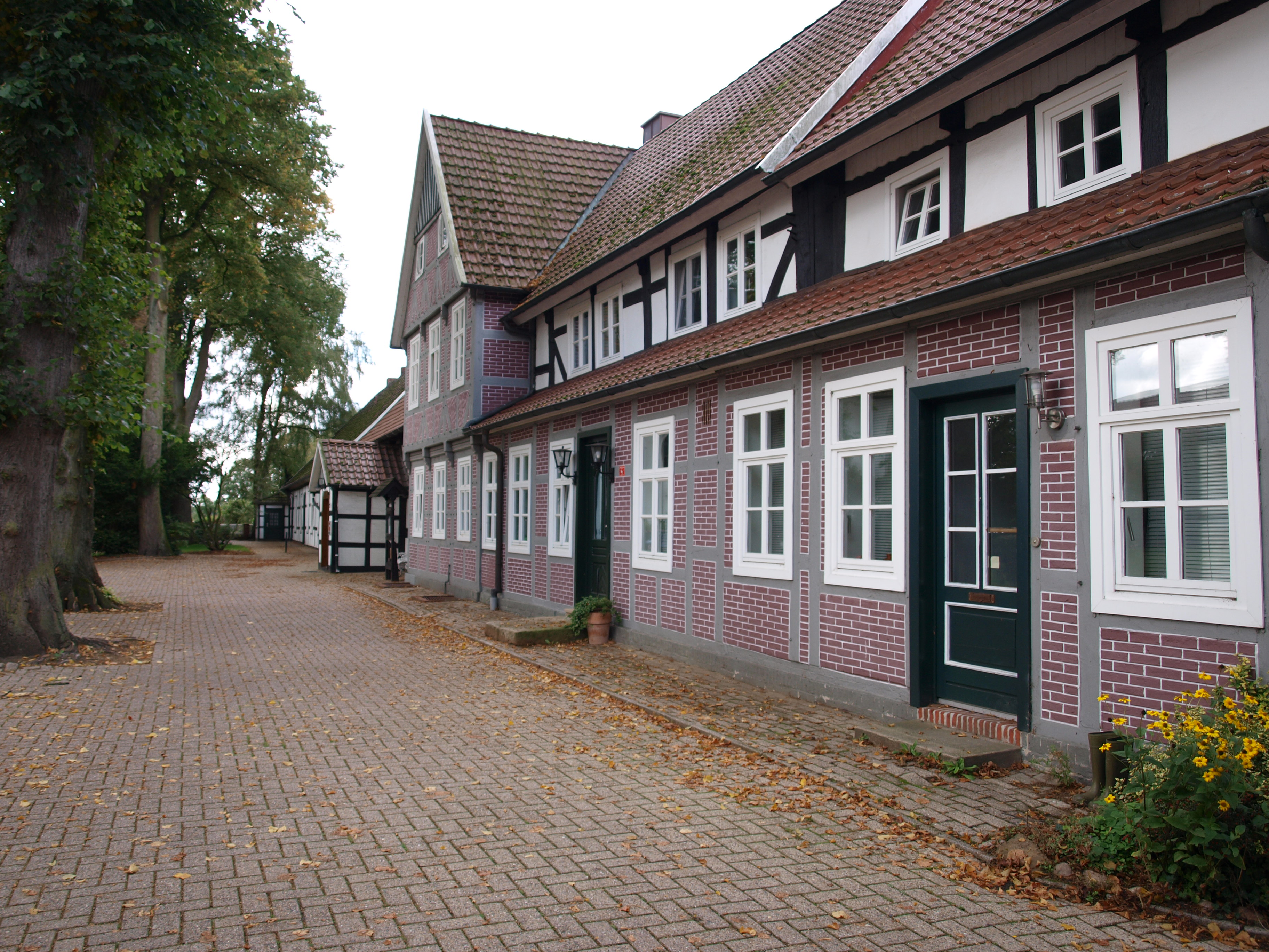 Menslage Kirchwinkel